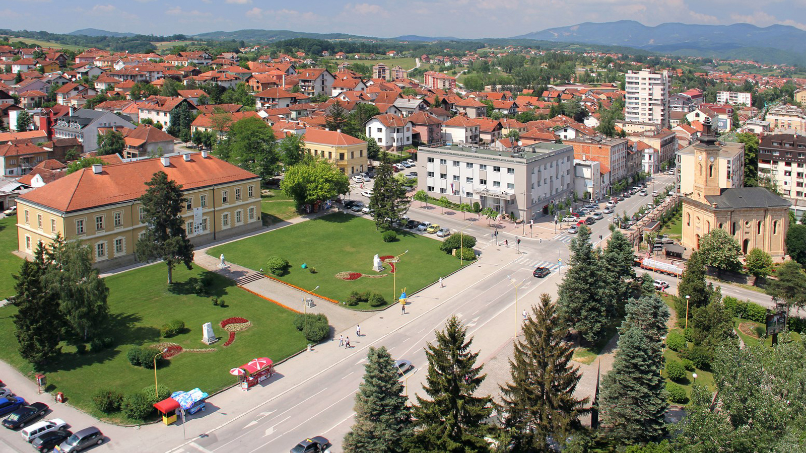 Grad Gornji Milanovac